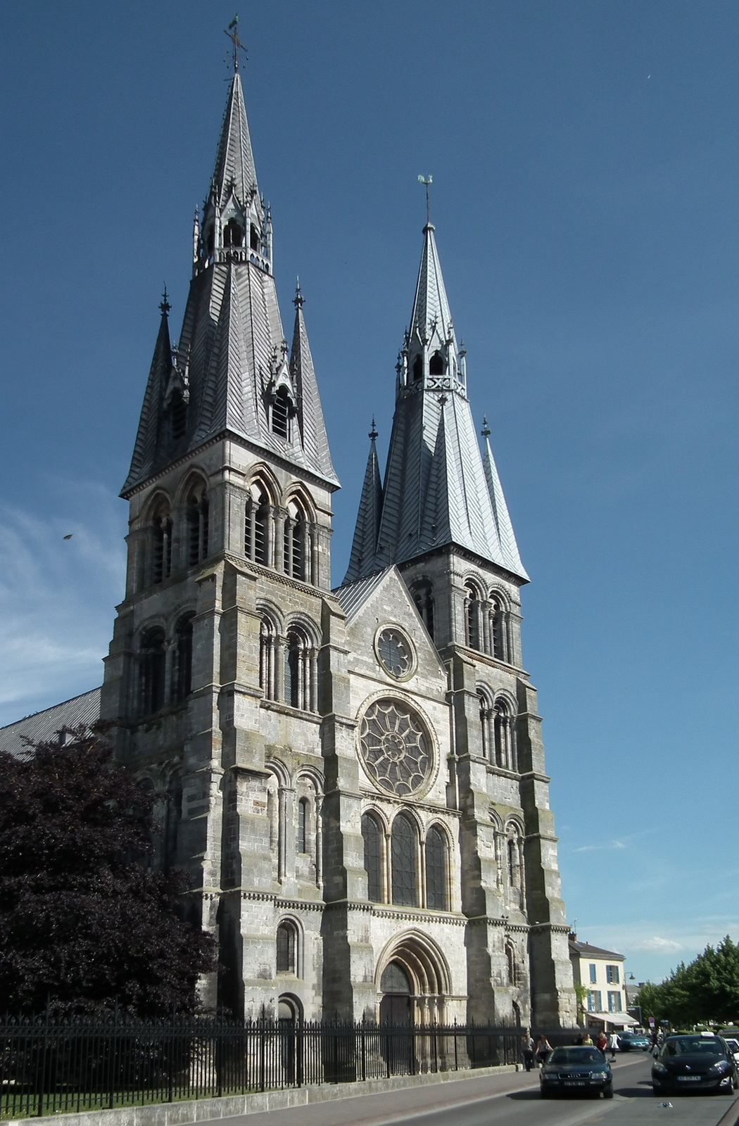 Church of Notre-Dame-en-Vaux Native nameCollégiale Notre-Dame-en-VauxLocationChâlons-en-Champagne, FranceCoordinates48° 57′ 27.43″ N, 4° 21′ 49.5″ E